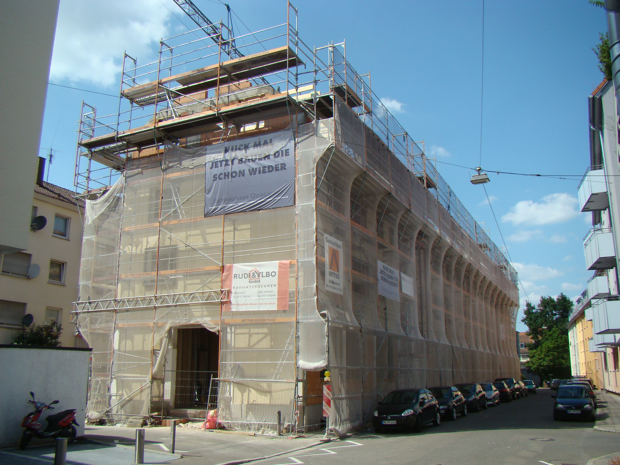 Sozialgerichtsgebäude in Heilbronn, Sanierung 2015